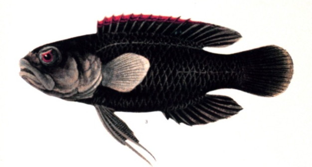 Plesiops coeruleolineatus